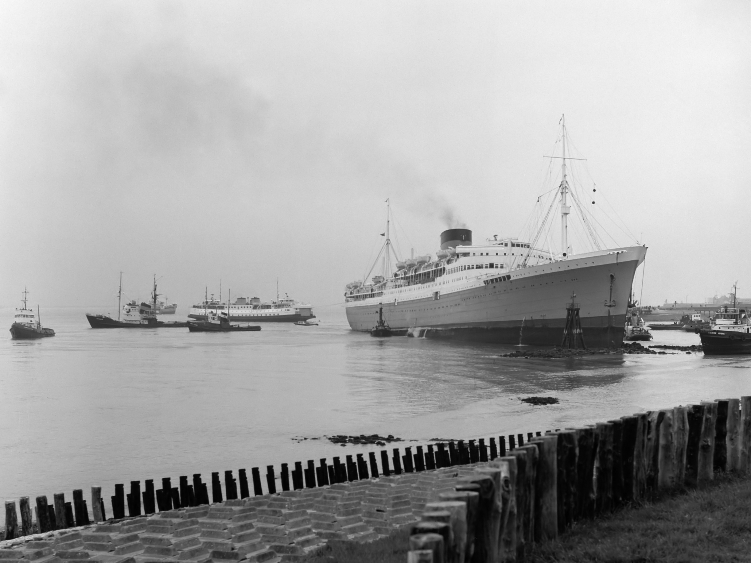 Passagierschip Cape Town Castle , aan de grond gelopen i n havenmond Vlissingse haven 10 mei 1966